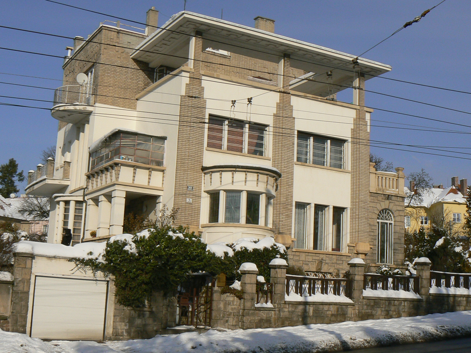 Lipova 4,Brno